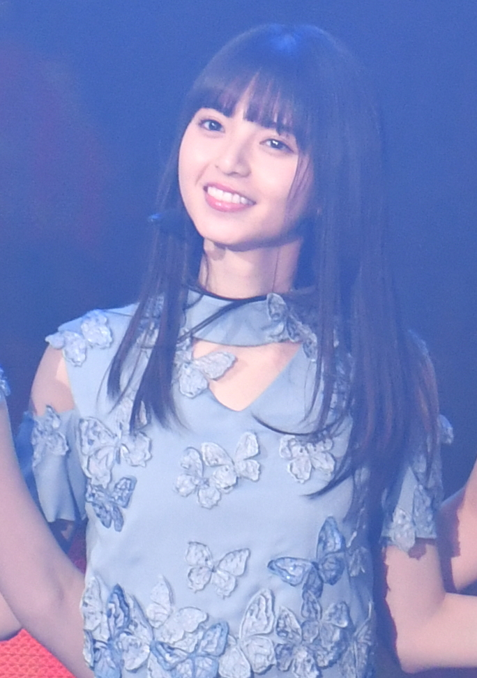 2019.01.26「第14回 KKBOX MUSIC AWARDS in Taiwan」乃木坂46 @台北小巨蛋